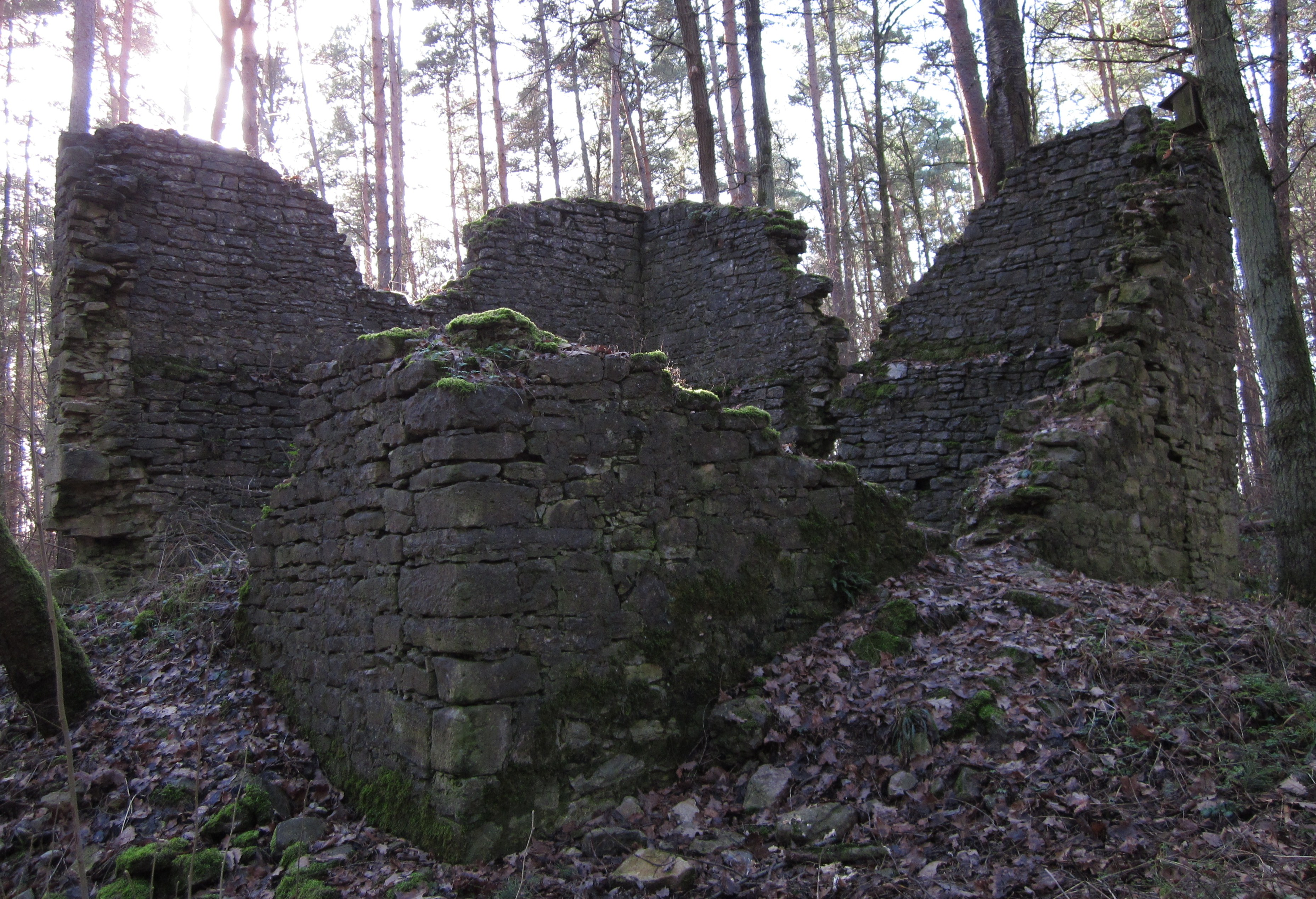 Ruine des "Blauen Turms" (Thüngen, an der Straße nach Retzbach)